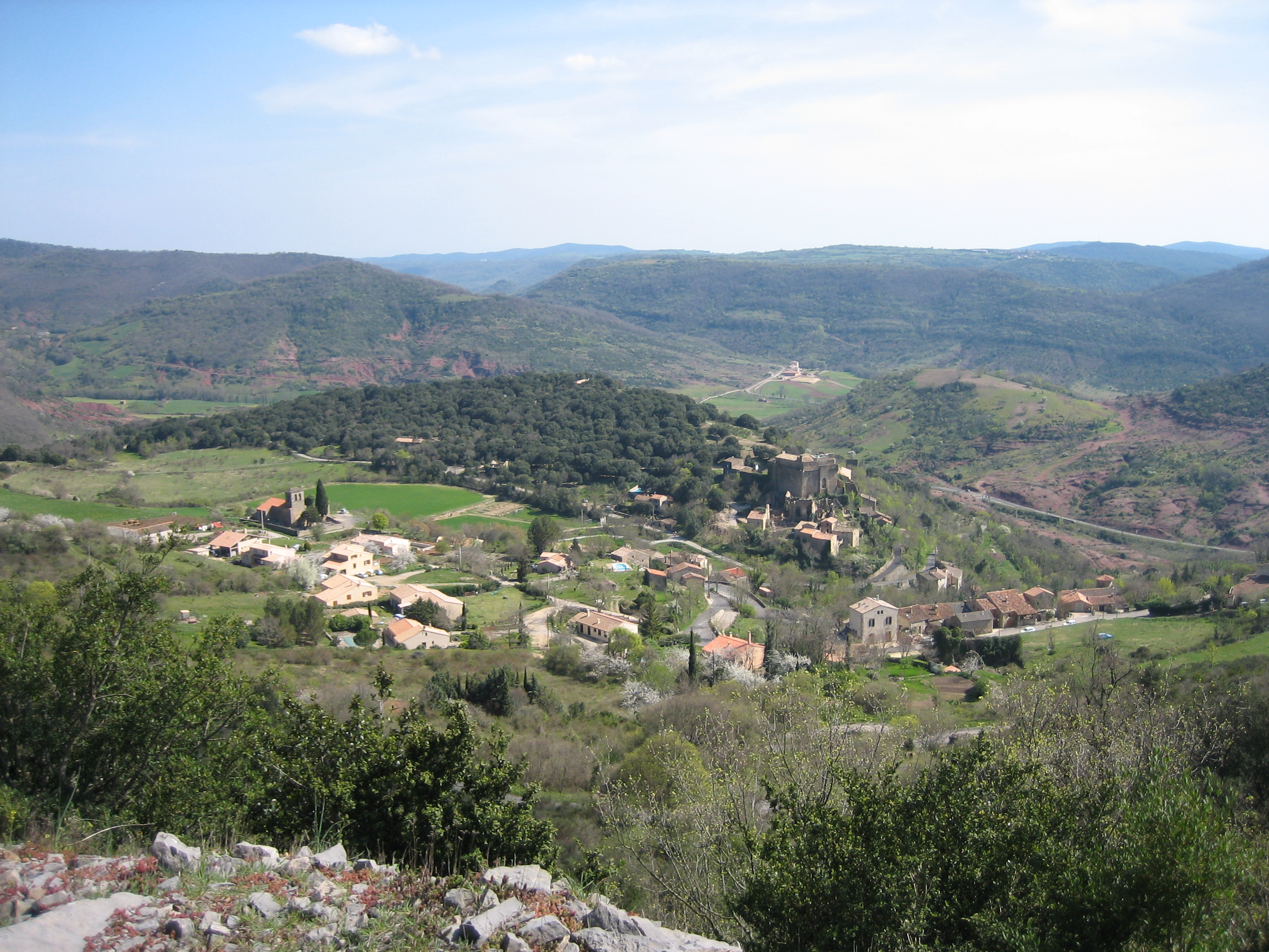 Dio (Dio-et-Valquières - Hérault) - vue générale : château et église.